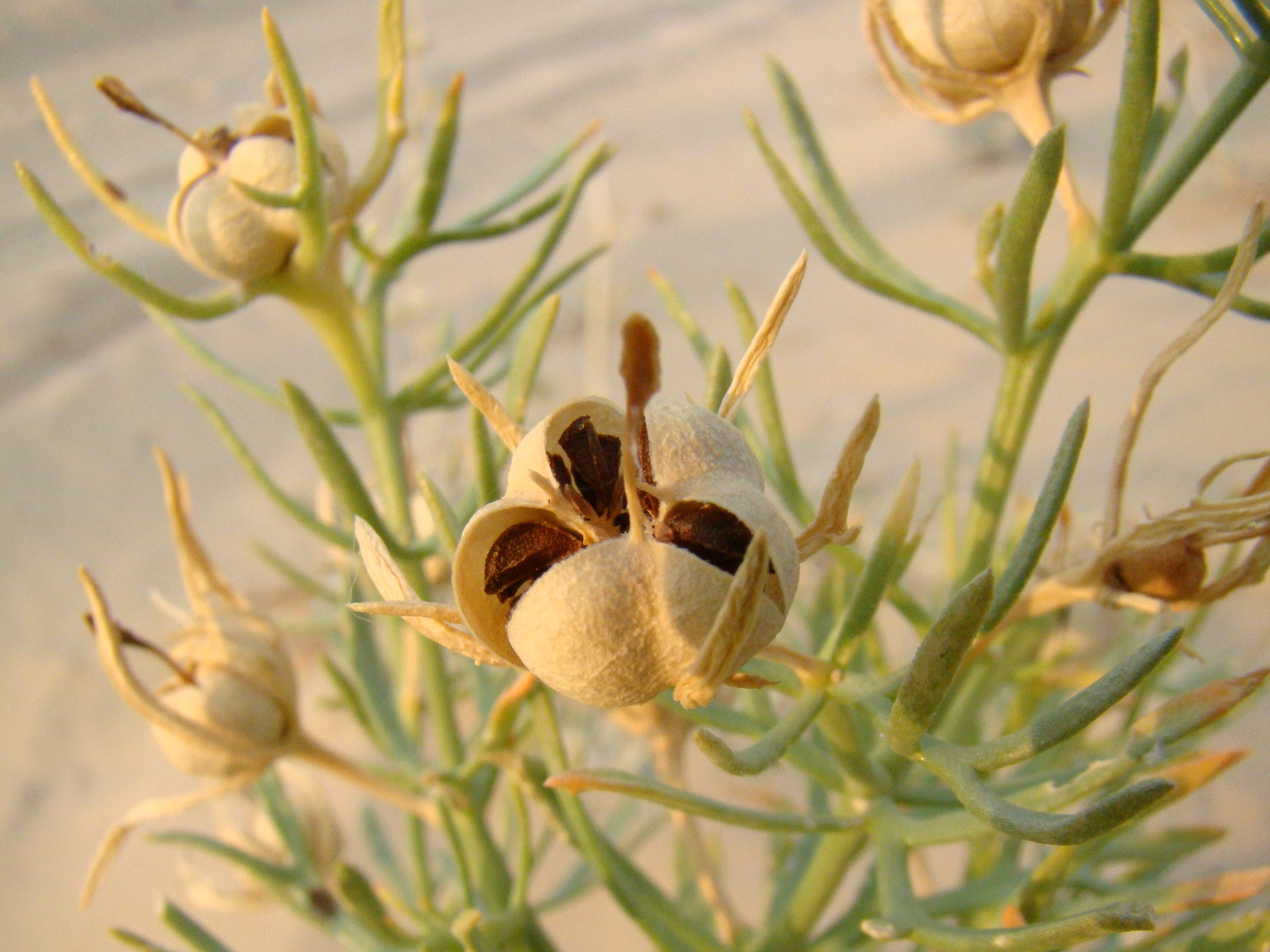 Гармала (Peganum harmala). Окрестости города Байконур, Казахстан